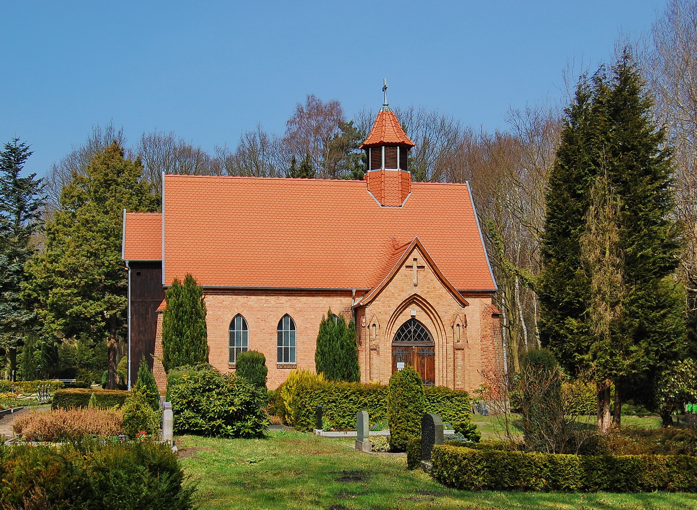 Dorfkirche von Gelbensande - Church of Gelbensande